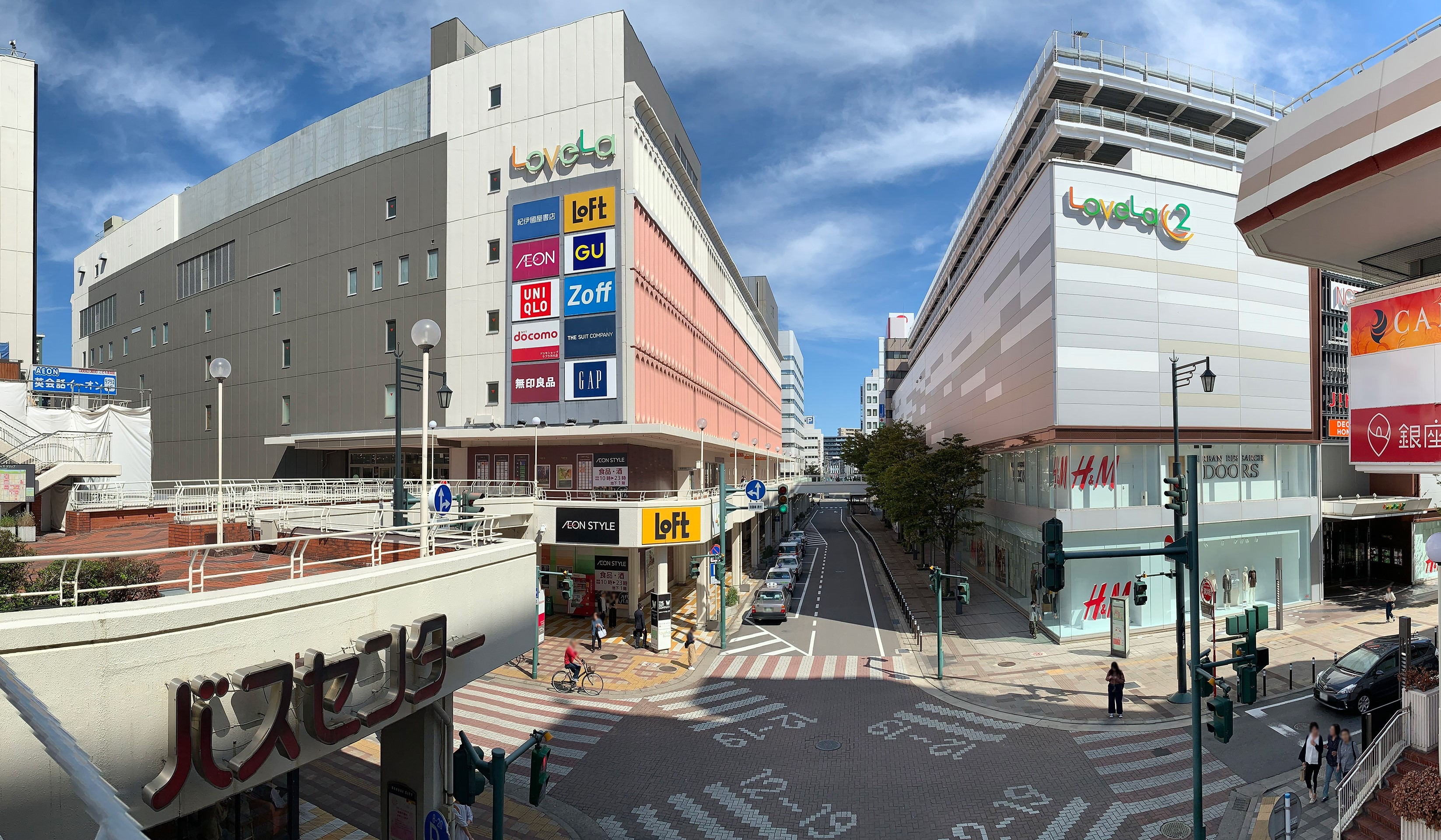 ラブラ万代（左）とラブラ2（右）、2019年9月撮影。をトリミング。